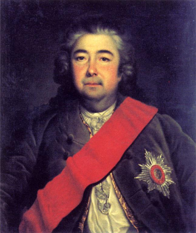 Iván Antónovich Cherkásov con la banda y la condecoración de la Orden de San Alejandro Nevski. Museo Estatal de Arte de Sarátov.